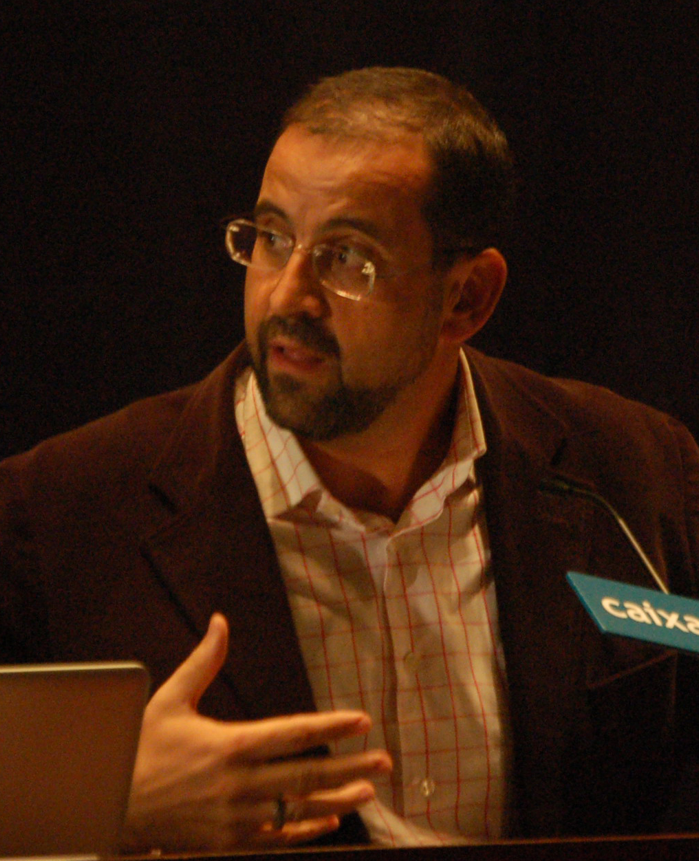 Henrique Monteagudo, sociolingüista galego, membro do Consello da Cultura Galega Monteagudo Licensing Monteagudo Monteagudo